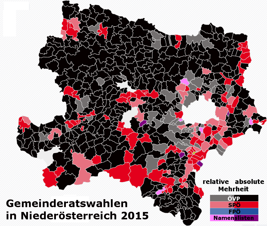 Ergebnisse der Gemeinderatswahlen in Niederösterreich 2015 – Mehrheiten in den Gemeinden ohne St. Pölten, Krems an der Donau und Waidhofen an der Ybbs